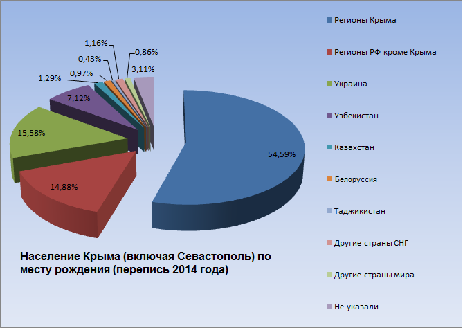 Население Крыма (республики Крым и города Севастополя) по месту рождения (перепись населения 2014 года)